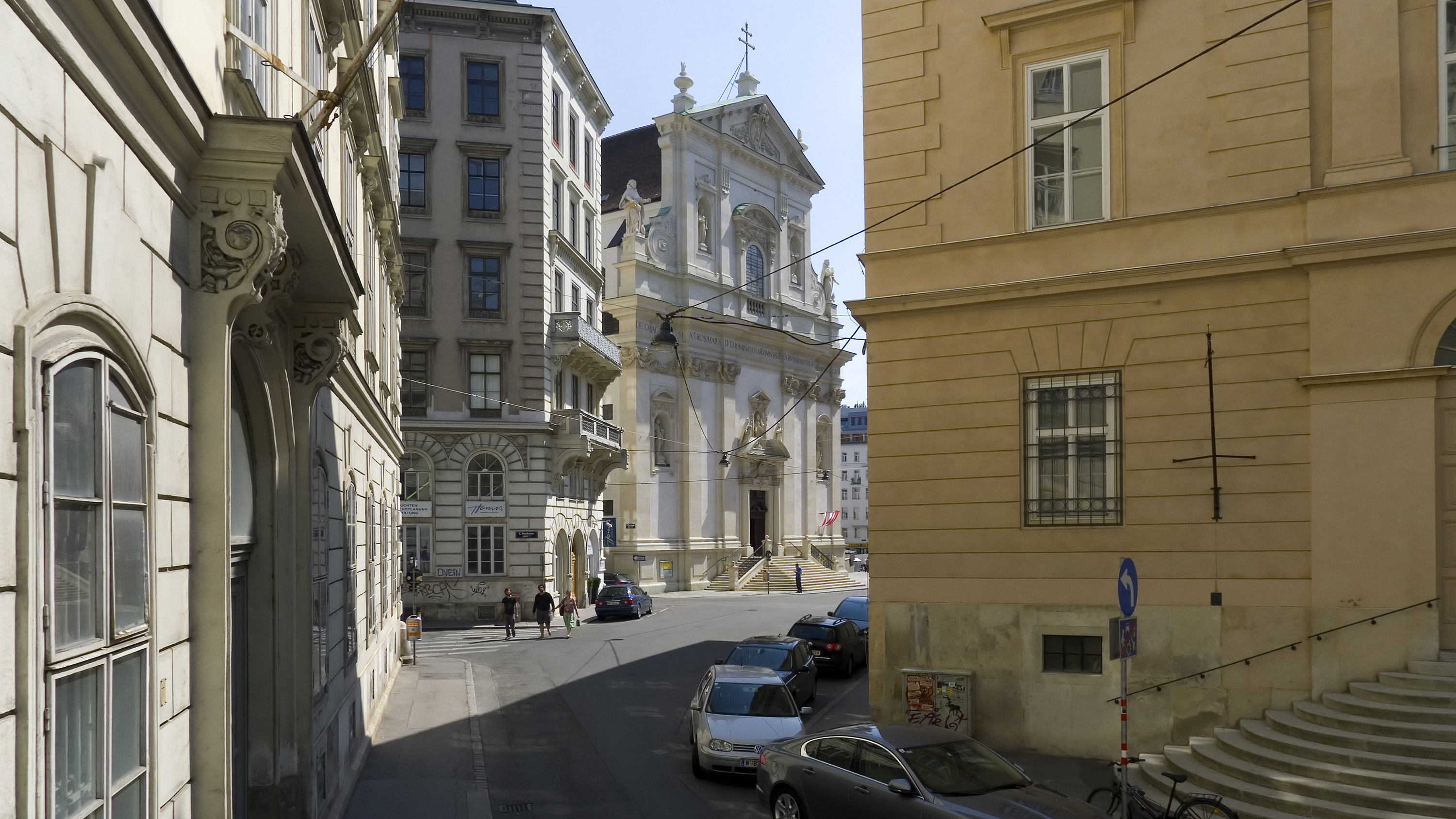 Postgasse in Wien 1 bei Nr. 12 Richtung Süden, im Hintergrund die Dominikanerkirche